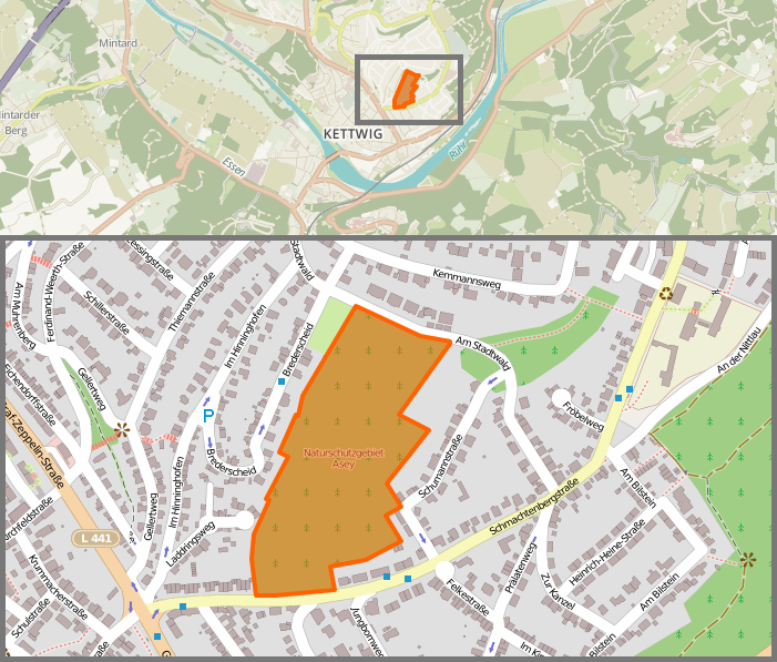 Naturschutzgebiet Ziegeleigelände Asey (E-004) – Karte